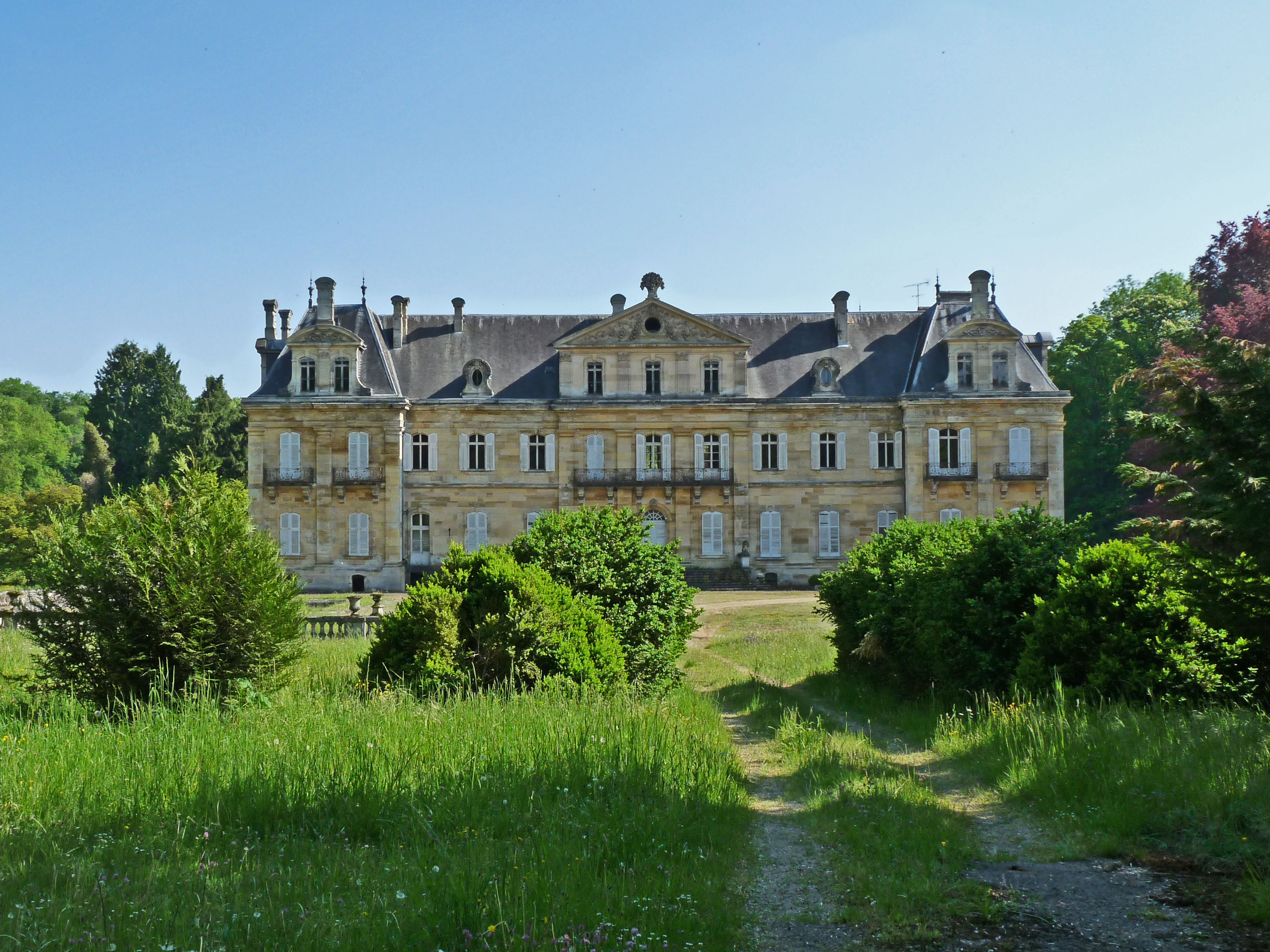 Château de Jean d'Heurs à Lisle-en-Rigault (Meuse).